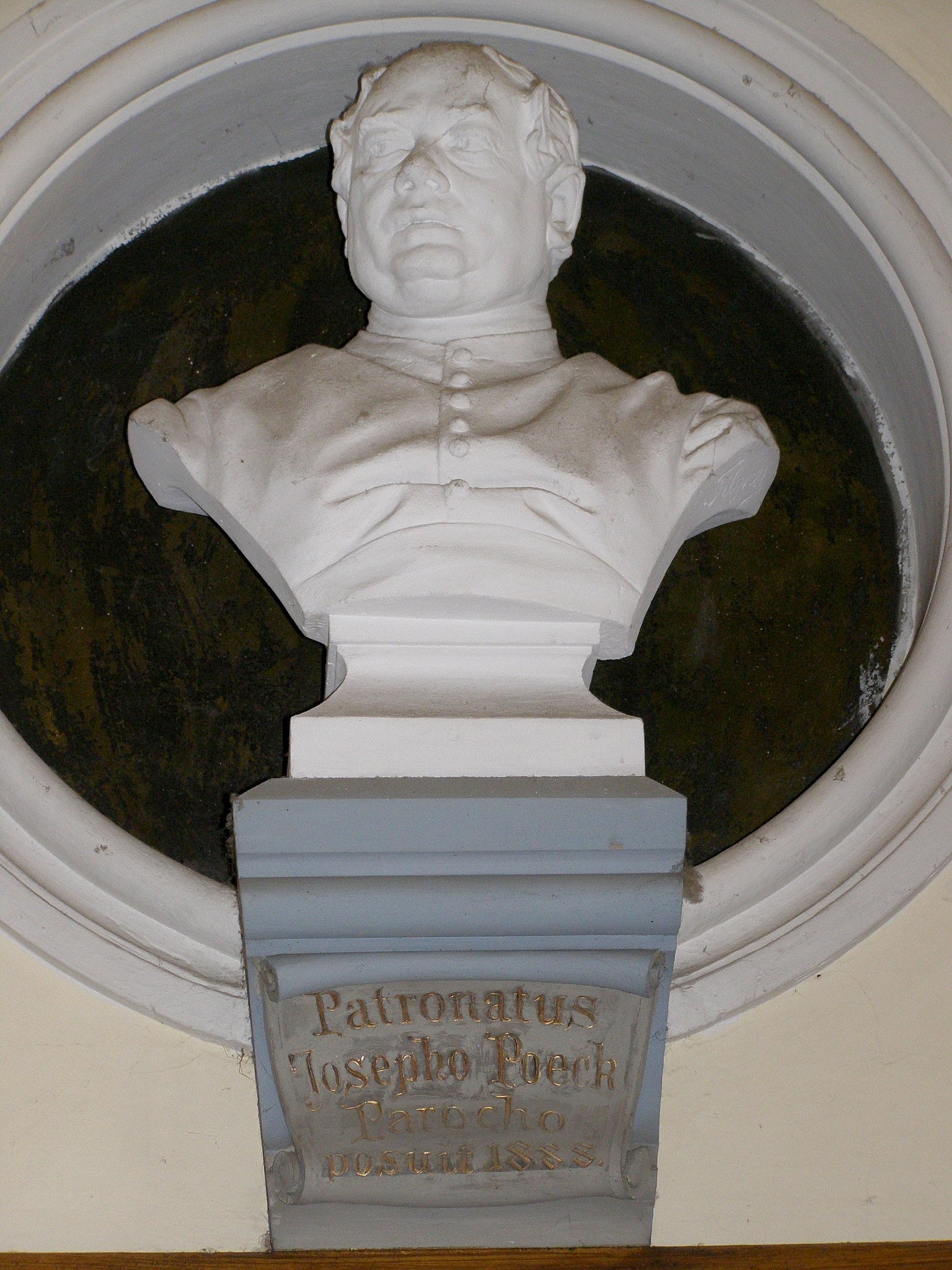 Mramorová busta niekdajšieho blumentálskeho farára Jozefa Poecka v predsieni, dielo sochára Viktora Tilgnera